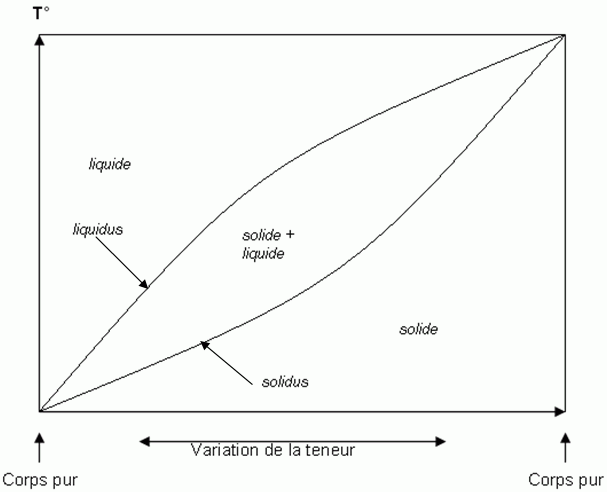 Diagramme de phase pour deux composés formant une solution solide. Contents 1 Licensing 2 Licensing 3 Original upload log 4 Original upload log Licensing Catégorie:Schémas